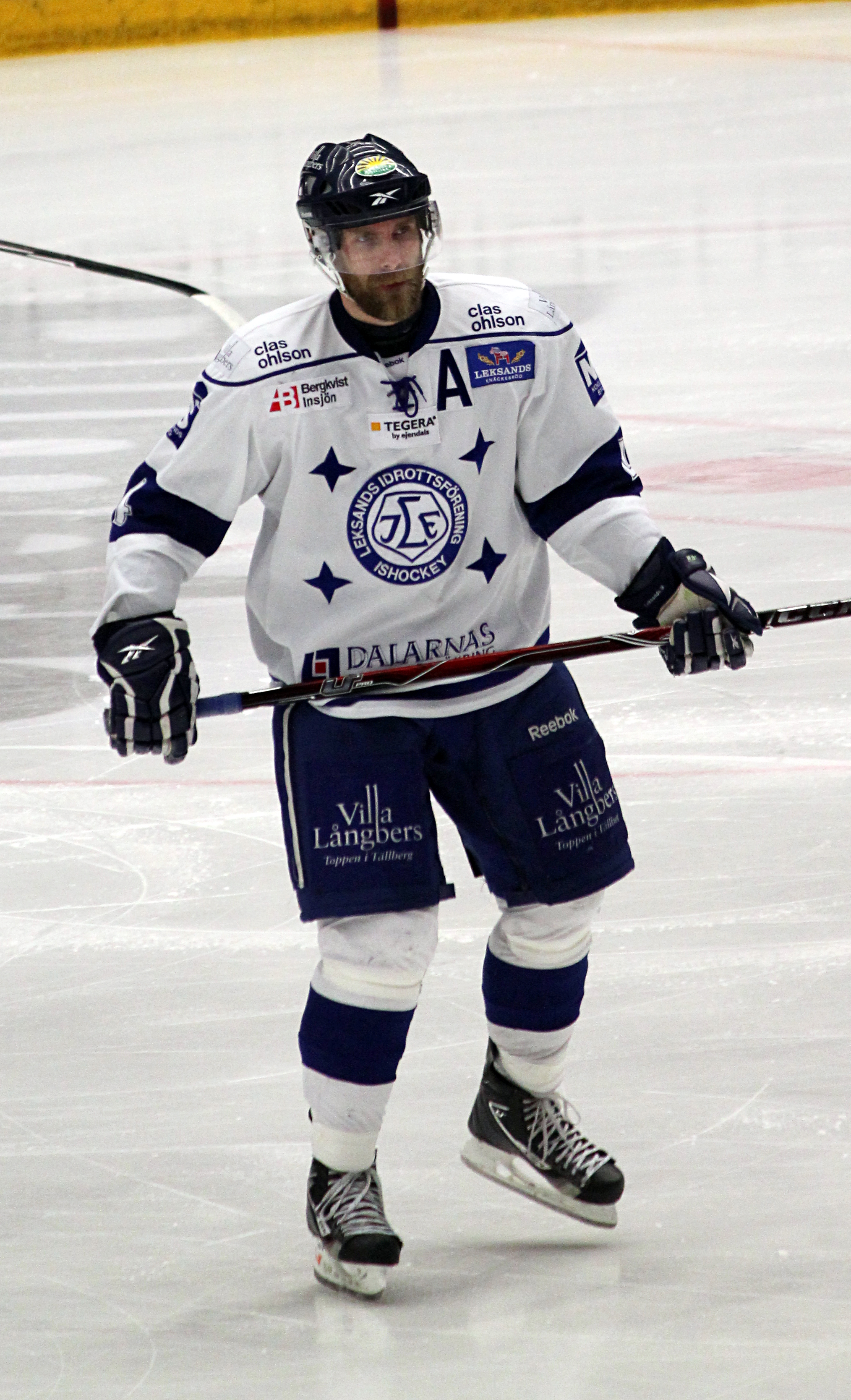 Johan Svedberg för Leksands IF mot Västerås IK 29 januari 2011.